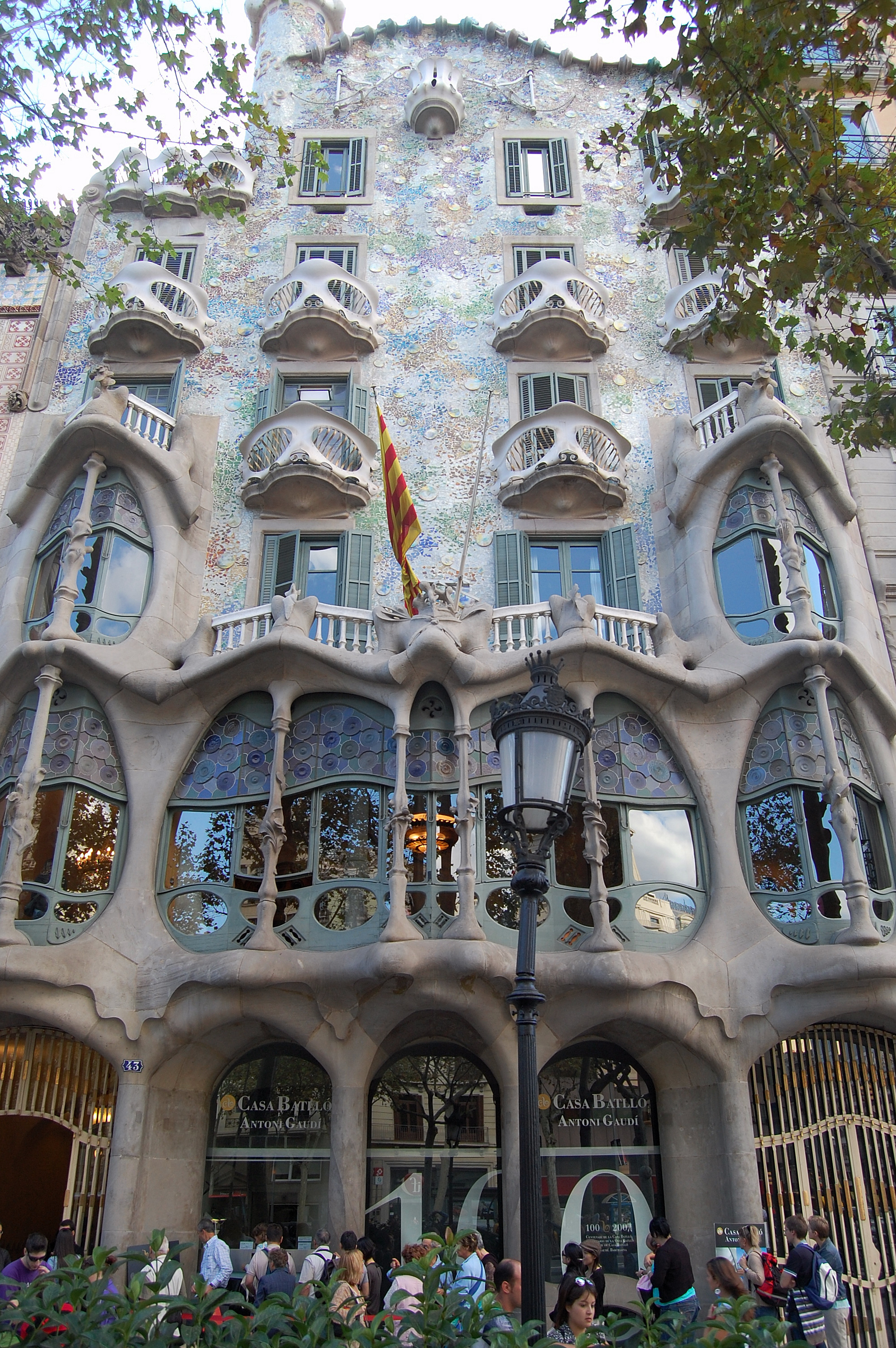 Casa Batlló - Barcellona Antoni Gaudí i Cornet